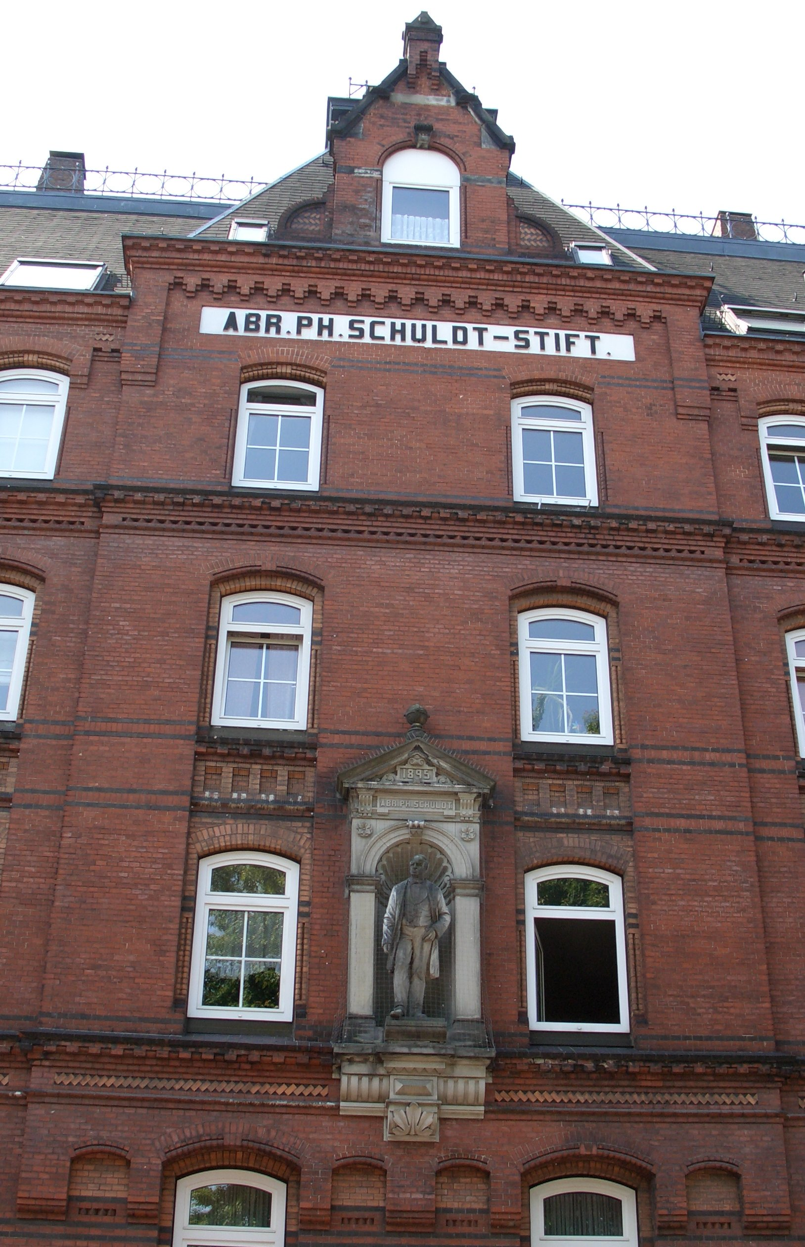 Bild eines Wohnhauses des Abraham-Philipp-Schuldt-Stifts mit Skulptur des Gründers an der Ecke Enckeplatz / Hütten in der Hamburger Neustadt hinter der Hamburger Handwerkskammer. Aufgenommen am 16.6.2005. Das Gebäude wurde 1895/96 nach Entwürfen von Hinrich Fittschen gebaut und ist Teil ein größeren Ensembles, daß sich an den Hütten (Hausnummern 1 bis 12) und dem Pilatuspool (Hausnummern 14 bis 24) erstreckt. This is a photograph of an architectural monument. Kategorie:Bild:Gebäude